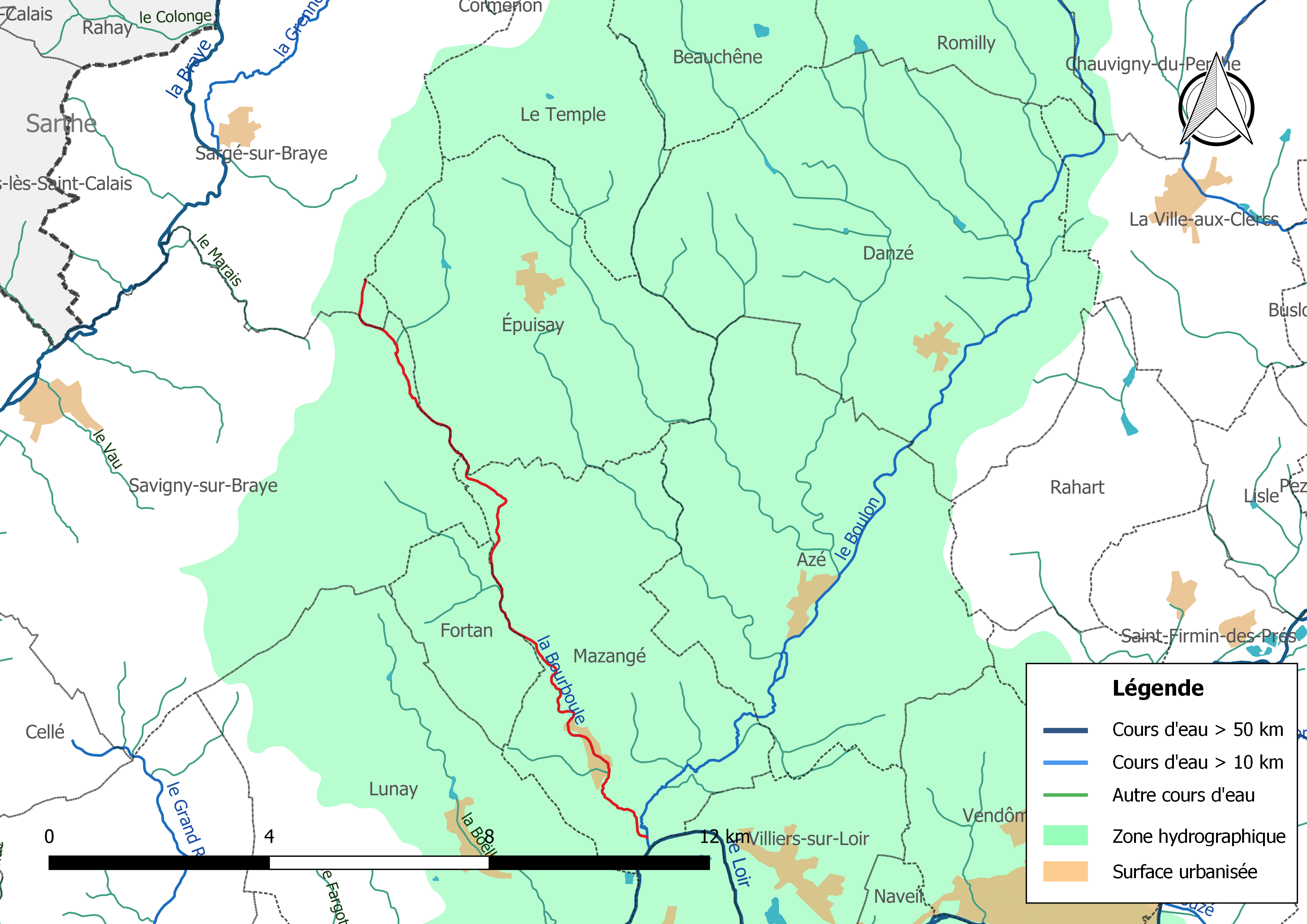 Carte du cours d'eau « la Bourboule » et de son bassin versant (zone hydrographique dans laquelle il s'insère).